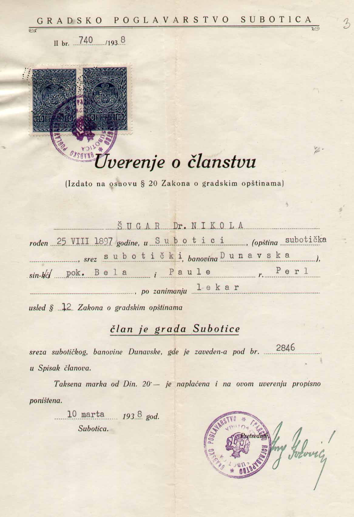 Фотографија потврде да је Никола Шугар становника града Суботице